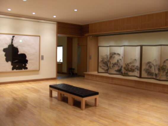 Museum für Ostasiatische Kunst Berlin Museum of Asian Art Native nameMuseum für Asiatische KunstParent institutionBerlin State Museums LocationBerlinCoordinates52° 27′ 21″ N, 13° 17′ 33″ E Established4 December 2006Web page[1]Authority control : Q370045 VIAF: 153451772 ISNI: 0000 0004 4893 5104 LCCN: no2007157600 GND: 10163291-5 SUDOC: 146108868 WorldCat institution QS:P195,Q370045